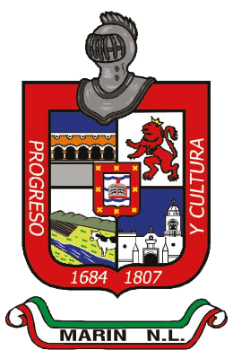 Escudo Municipal de Marín